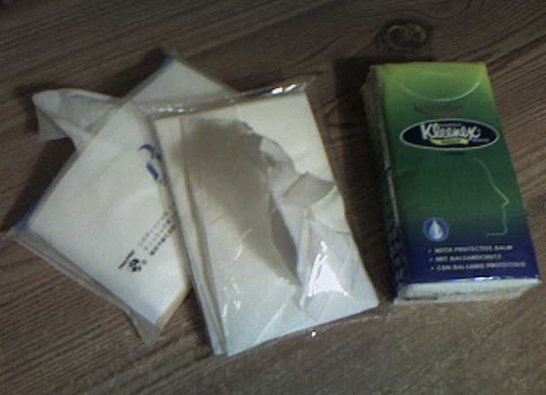 Photo de différents types de paquets de mouchoirs, pour illustrer l'article "mouchoir" de Wikipédia